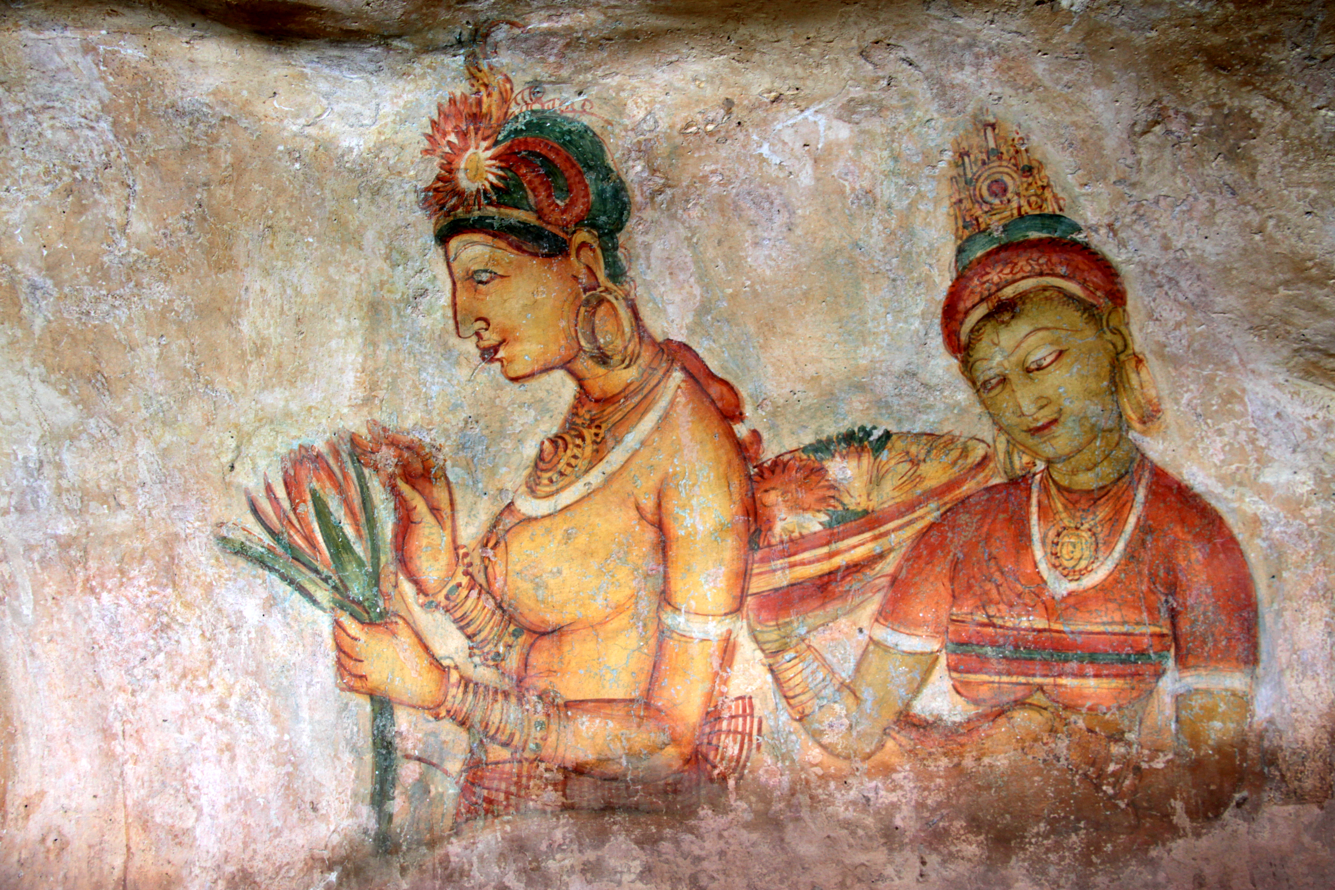 Sri lanka, peinture des demoiselles de sigiriya du 5eme siècle